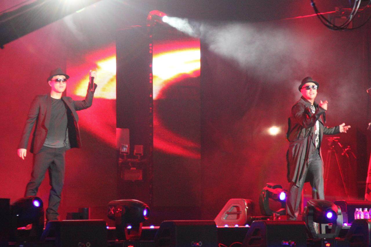 싸이월드 페스티벌